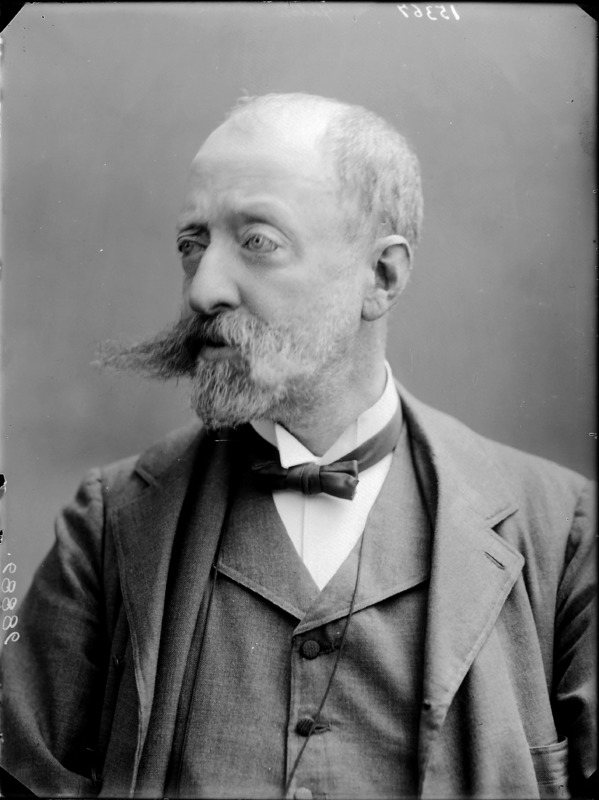 Arturo Faldi fotografato da Mario Nunes Vais